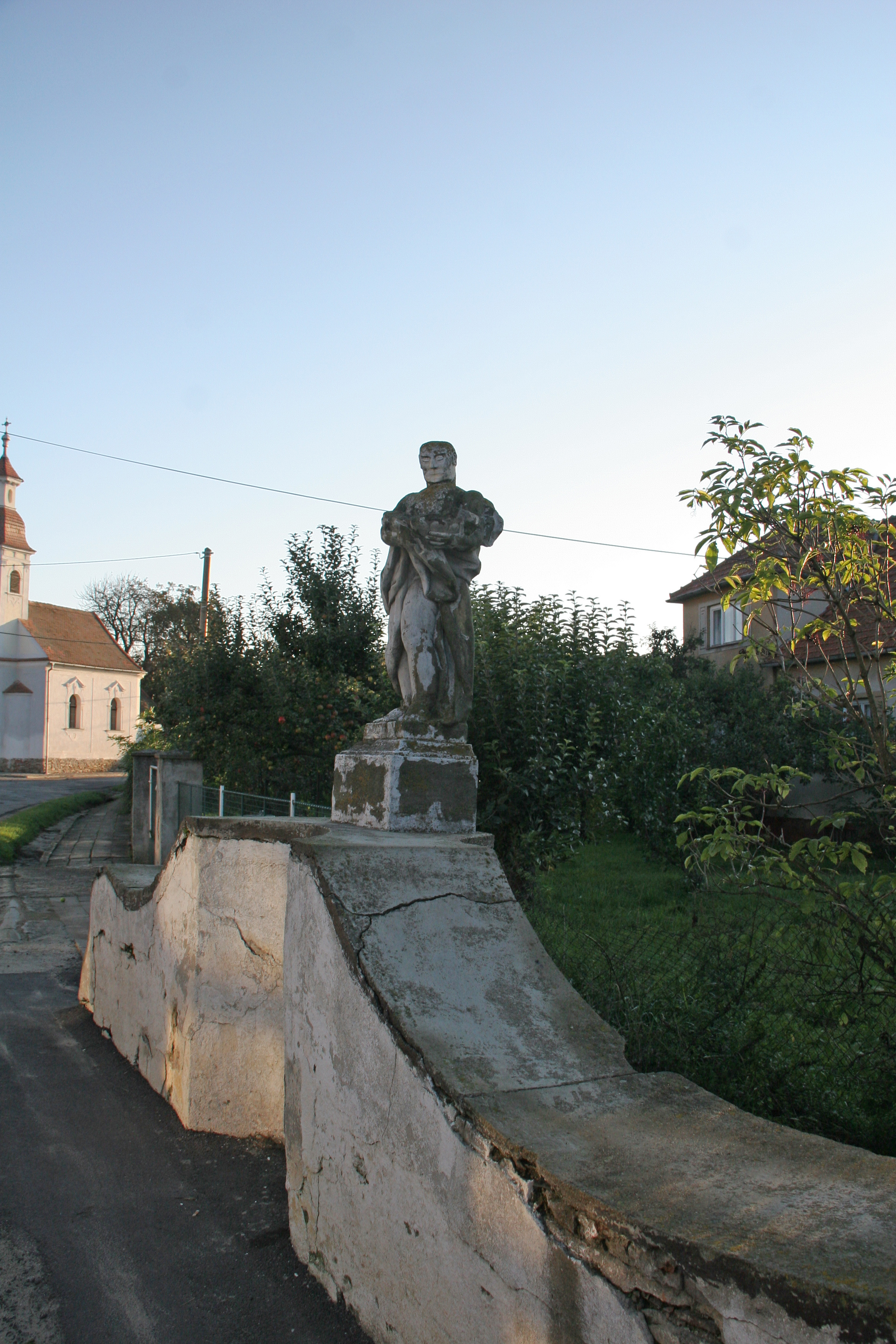 Silniční mostek, Vracovice (okres Znojmo).